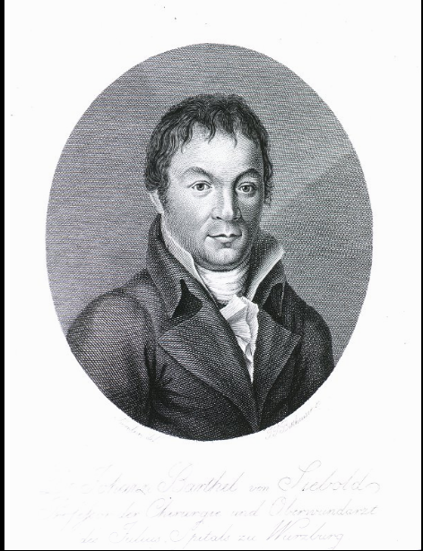 Dr. Johann Barthel von Siebold Körnlein del: J. P. Bittheuser sc. Subject (Keyword): Siebold, Johann Barthel 1774-1814